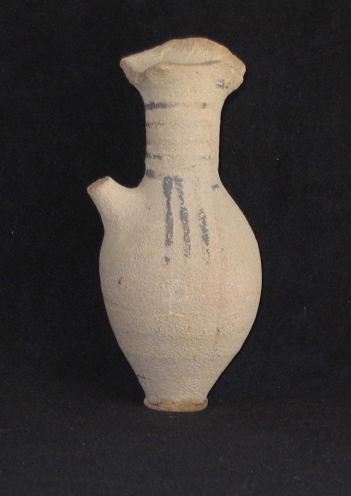 Vasetto lipareo X-VI sec a.C., Lipari. Autore della fotografia è Giorces.